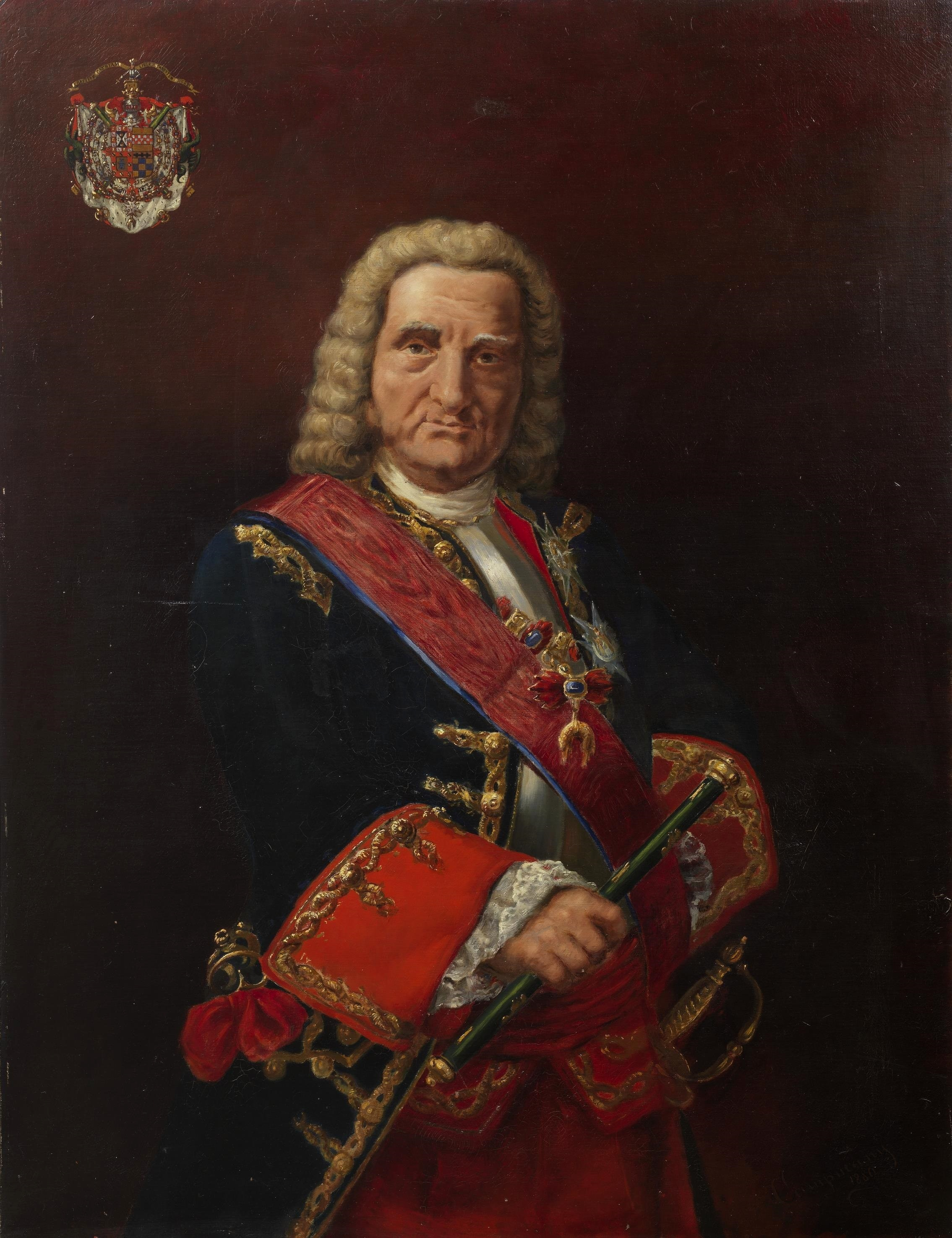 Retrato del aristócrata español Jaime de Guzmán-Dávalos y Spínola (1690-1767), marqués de la Mina, conde de Pezuela de las Torres, teniente general del ejército español, capitán general de Cataluña y caballero de la Orden del Toisón de Oro, de la Orden del Espíritu Santo, de la Orden de San Miguel, de la Orden de Calatrava y de la Orden de Montesa.